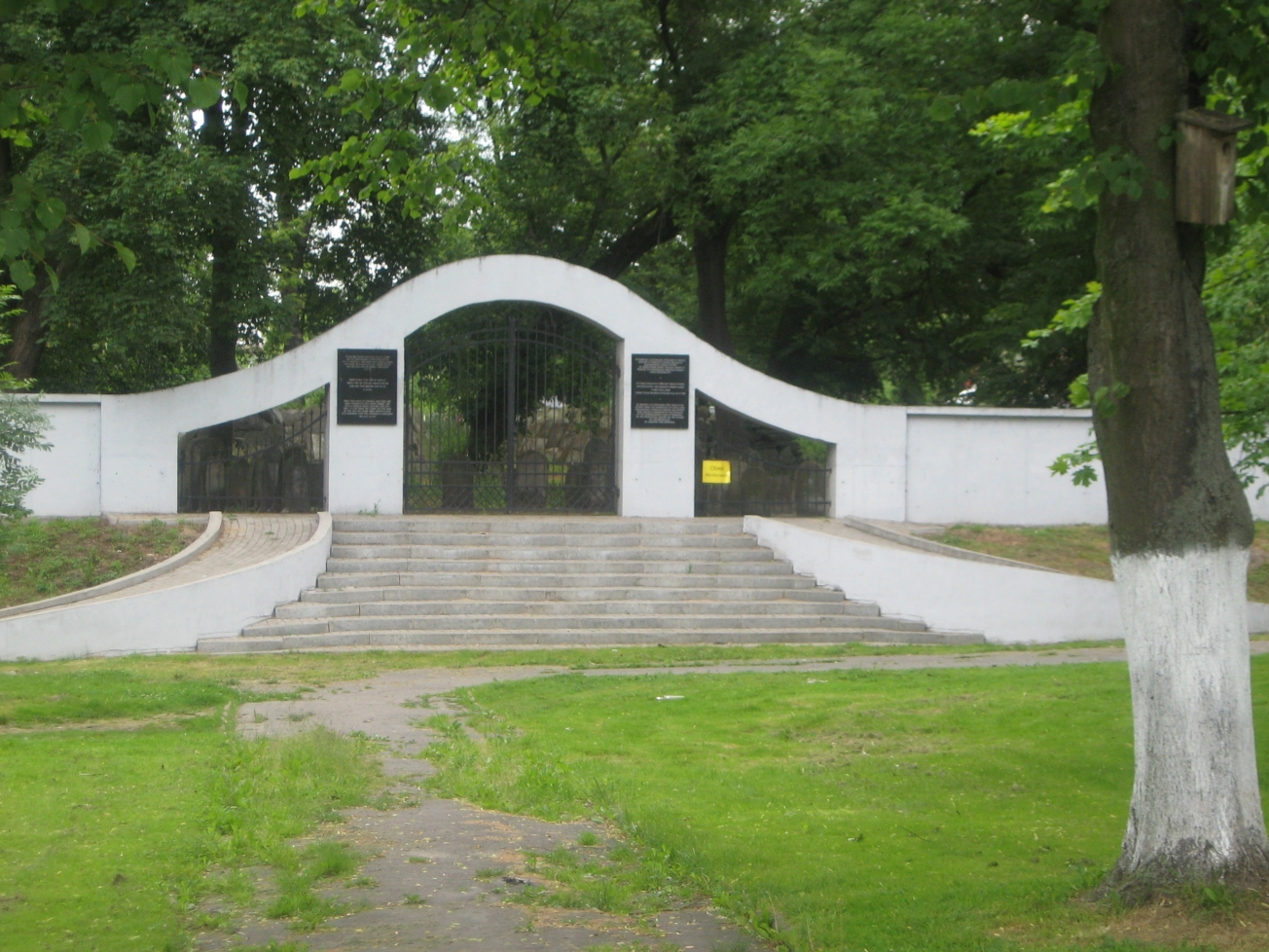 Brama wejściowa na cmentarz żydowski w Łosicach